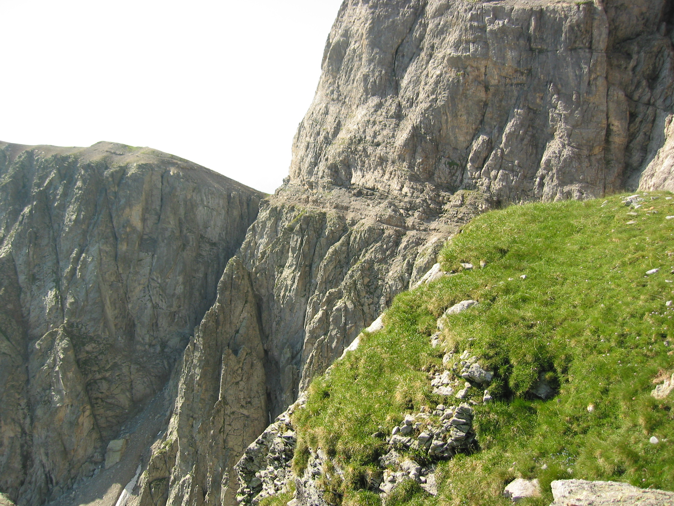 Sommet herbeux d'un des éperons granitiques de la falaise sud du cirque de Barrosa, avec vue sur la partie de la corniche du chemin des mines proche de son pont de départ, au col d'Espluca Ruego.